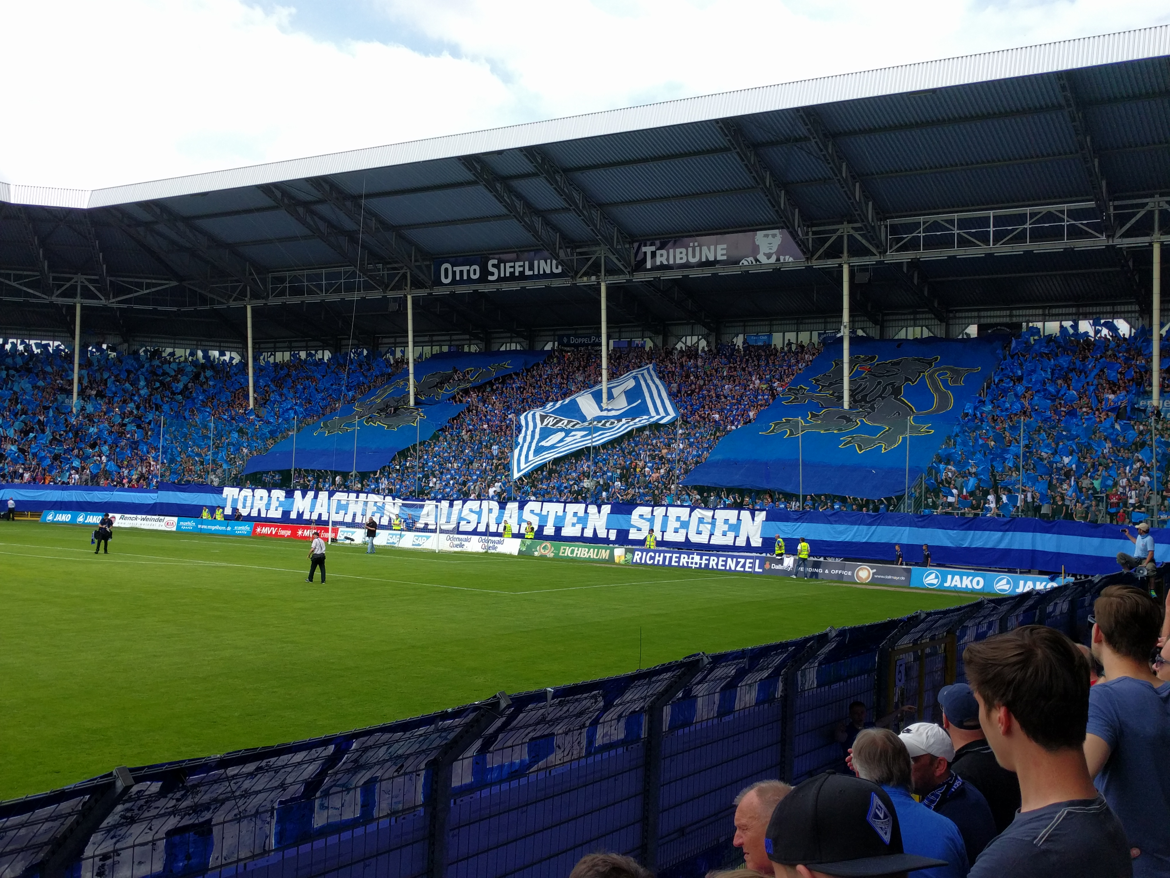 Otto Siffling Tribüne (Osttribüne) im Carl-Benz-Stadion des SV Waldhof Mannheim 07. Die Aufnahme entstand vor dem Relegationsspiel um den Aufstieg in die 3. Liga gegen die Sportfreunde Lotte am 29. Mai 2016.